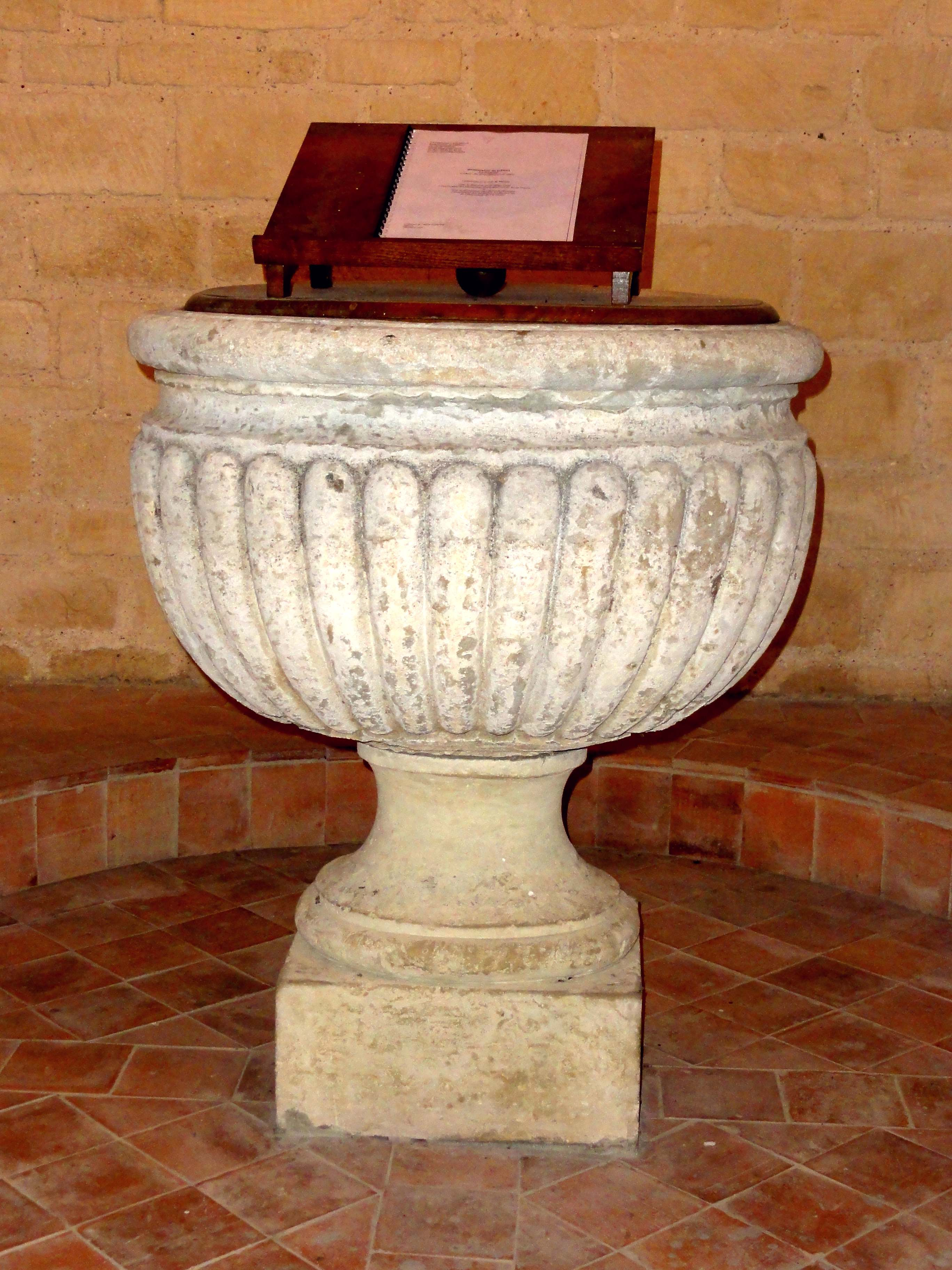 Mobilier de l'église - voir titre.